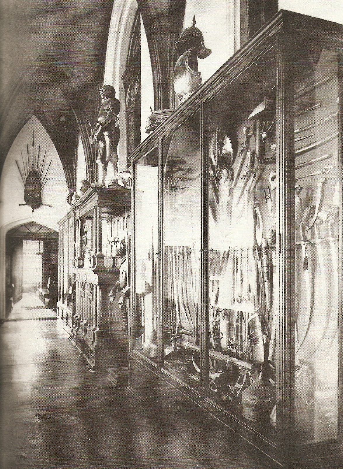 Kolekcja broni w pałacu Radolińskich w Jarocinie, rok 1908.